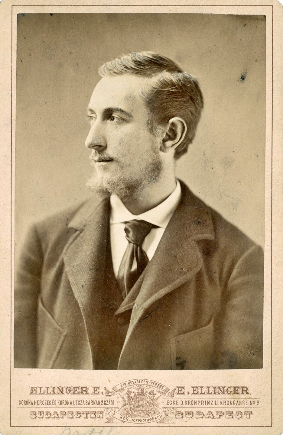 Bartók Lajos költő, drámaíró, szerkesztő